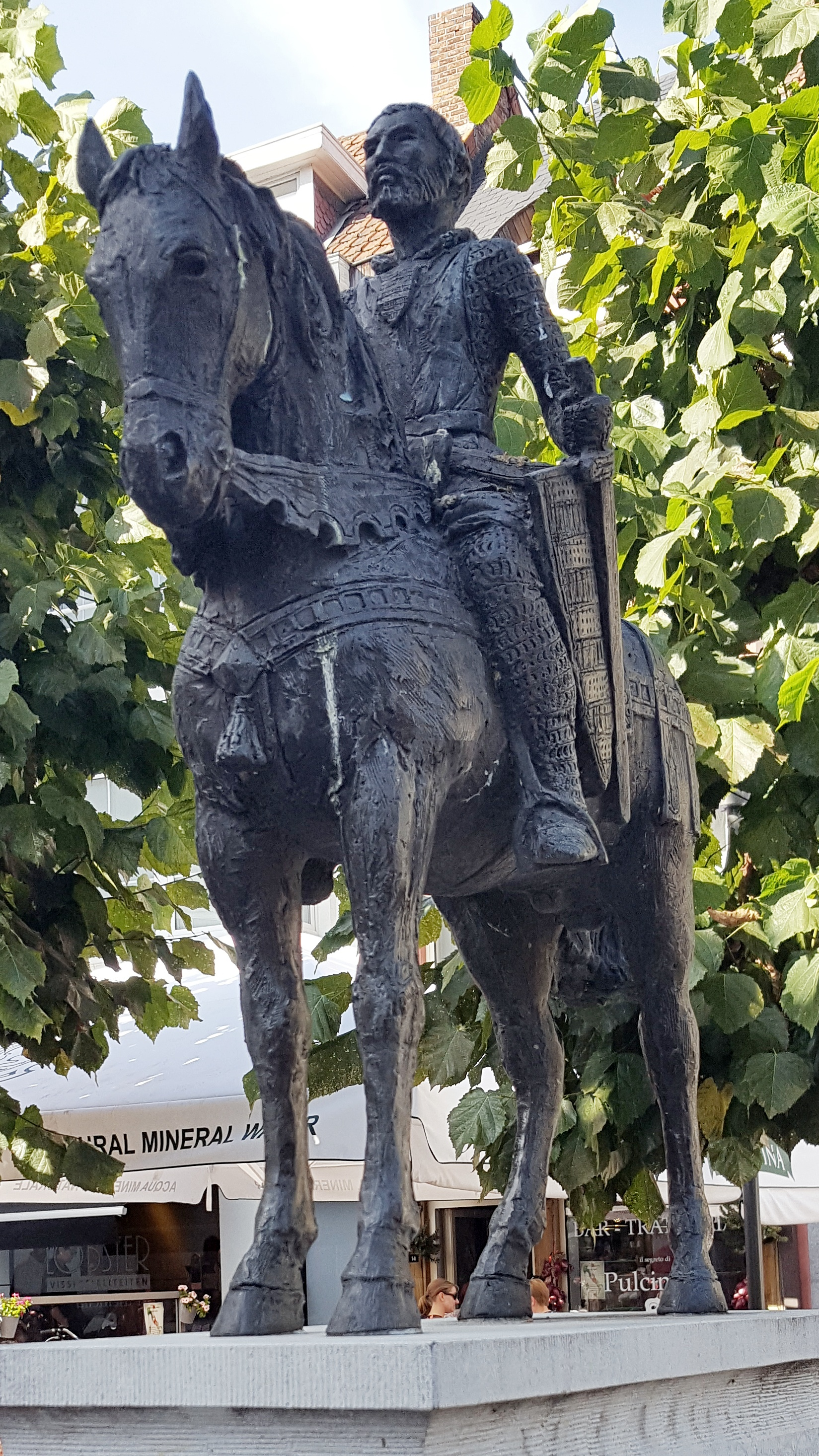 Estatua ecuestre del conde Arnaldo IV de Loon, en Hasselt (Bélgica). Autor de la estatua desconocido.